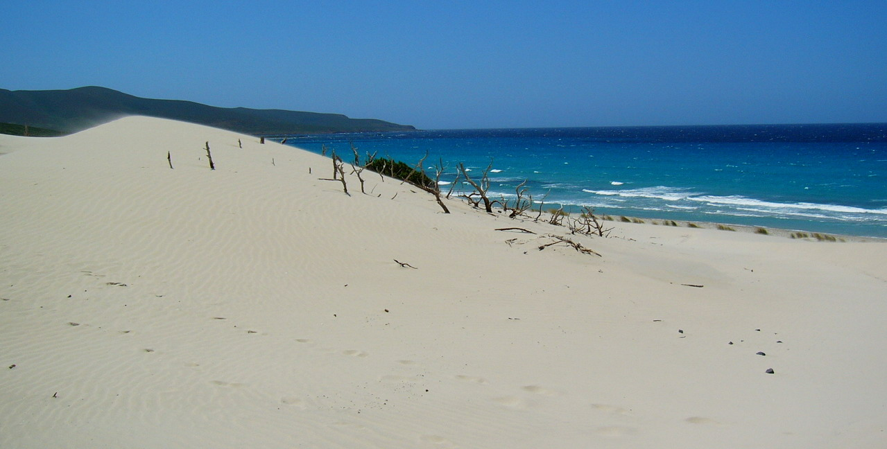 Porto Pino, Sant'Anna Arresi - Provincia di Carbonia / Iglesias